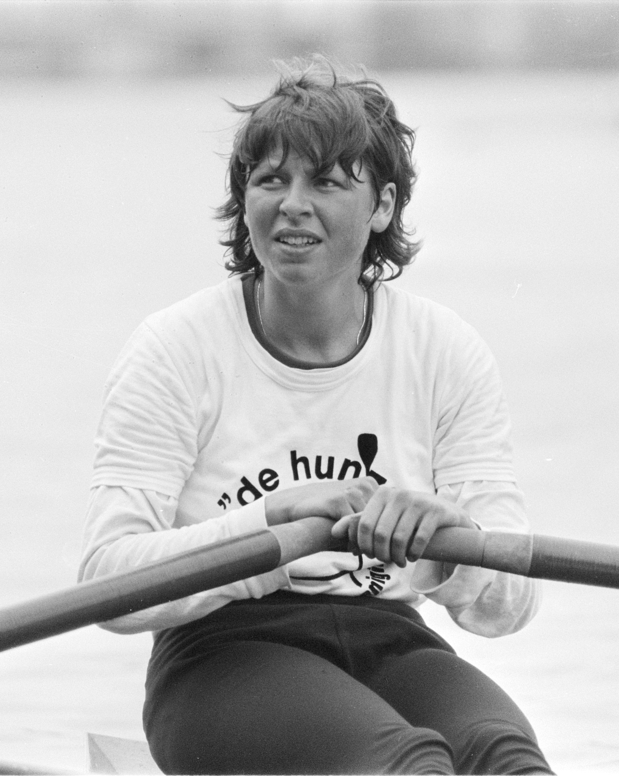 Roeien: Skifhead '84; bij de dames won Nicolette Hellema